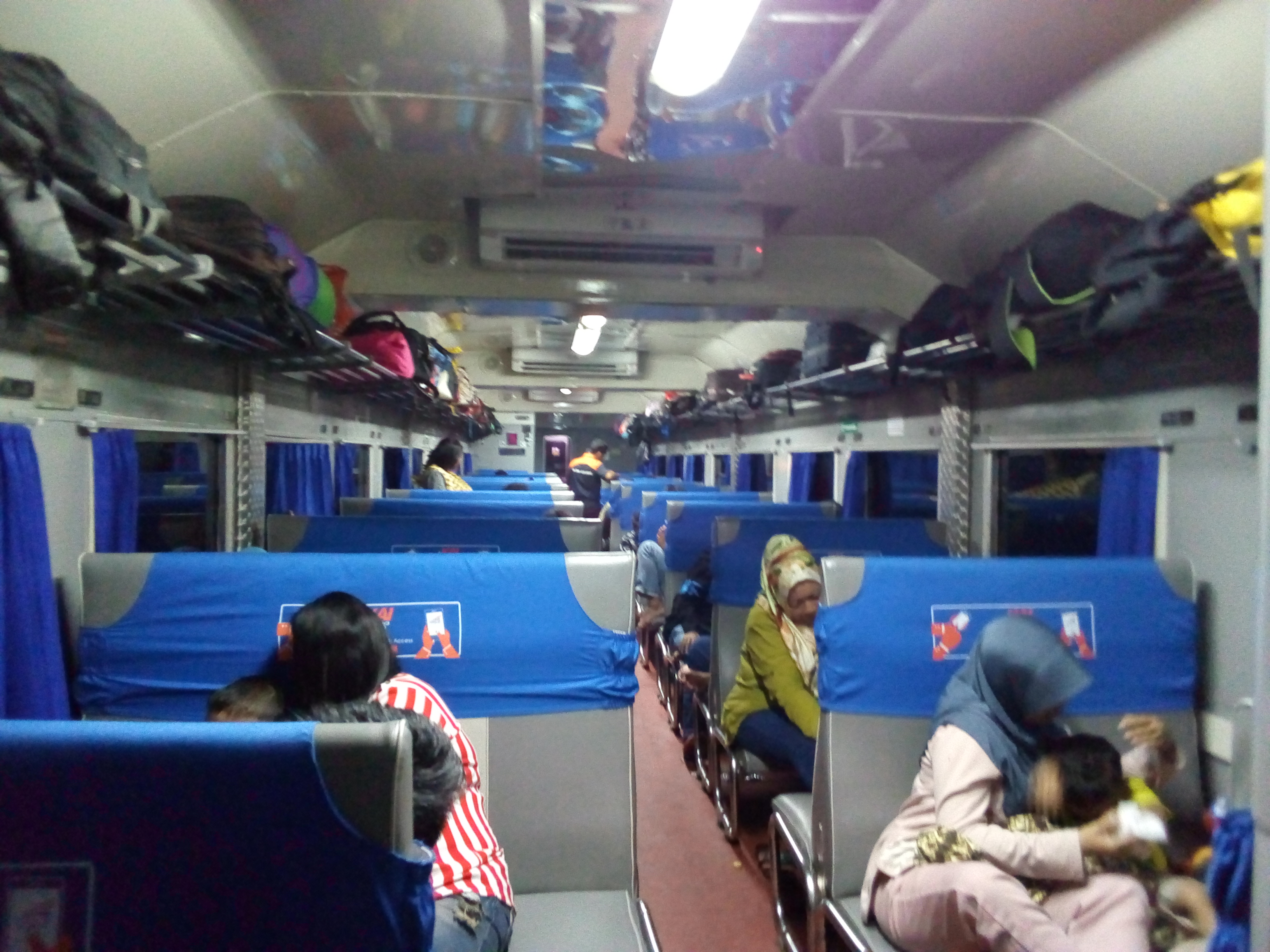 Interior Kereta Api Putri Deli